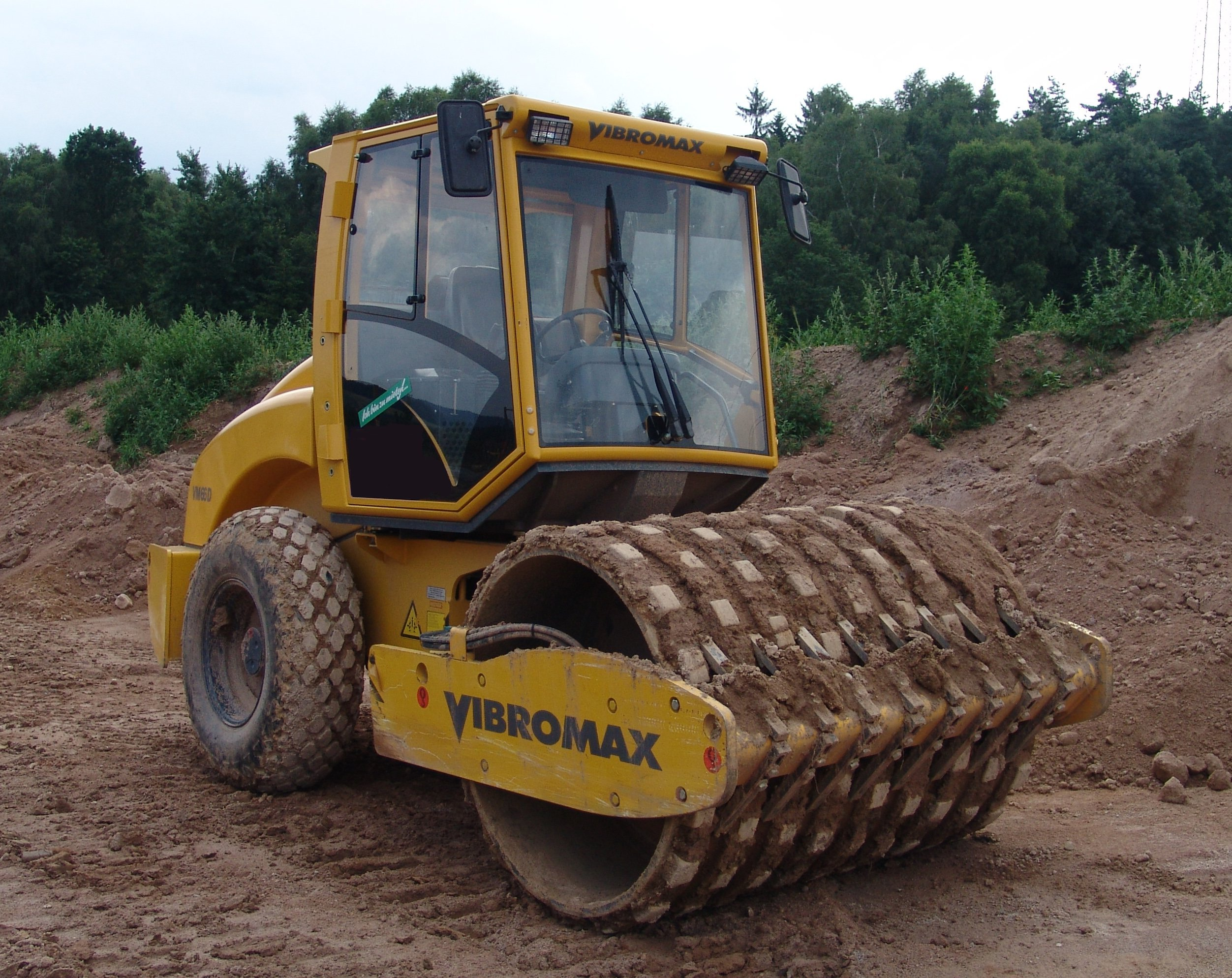 Verdichter-, Rüttelwalze